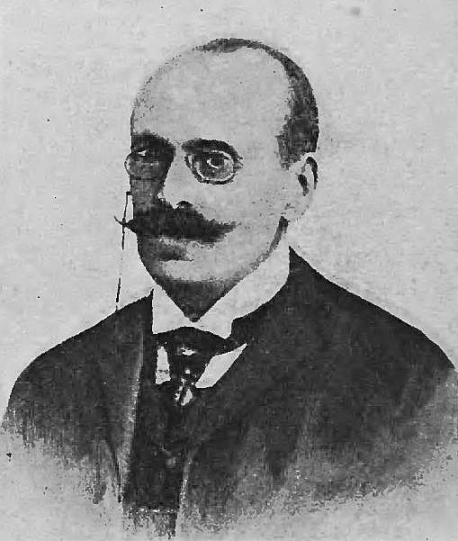 Aleksander Hirszberg (-1907)